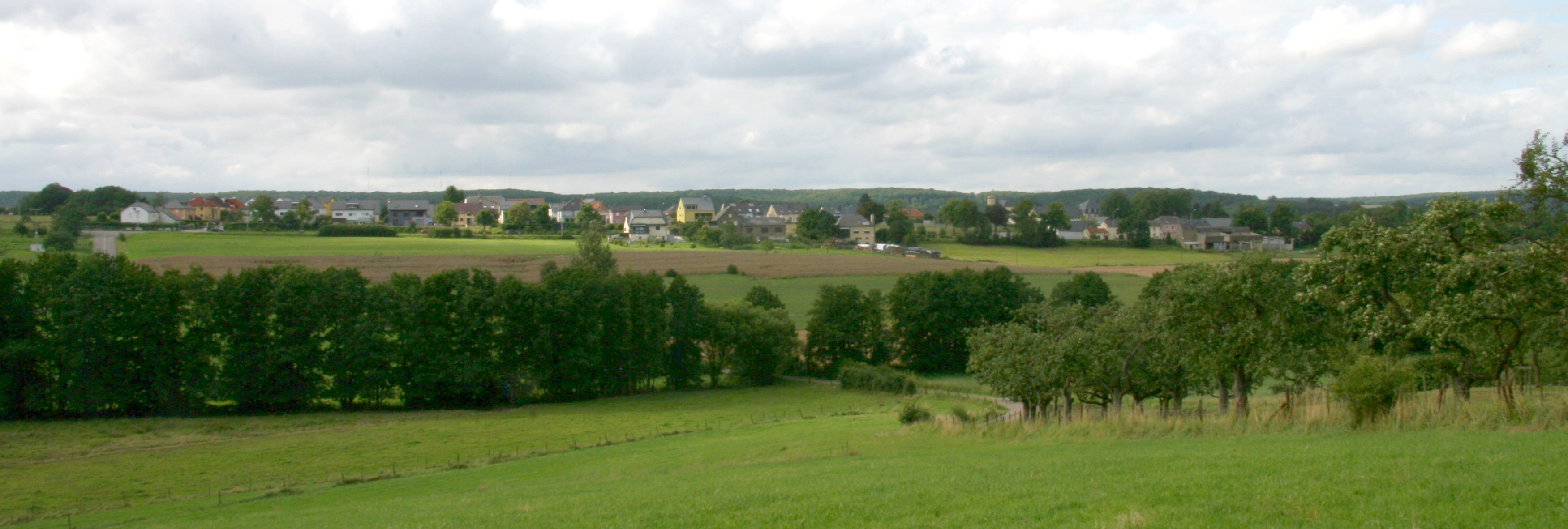 Vue op Bierg, an der Gemeng Betzder (The village of Berg in the municipality of Betzdorf, Luxembourg)